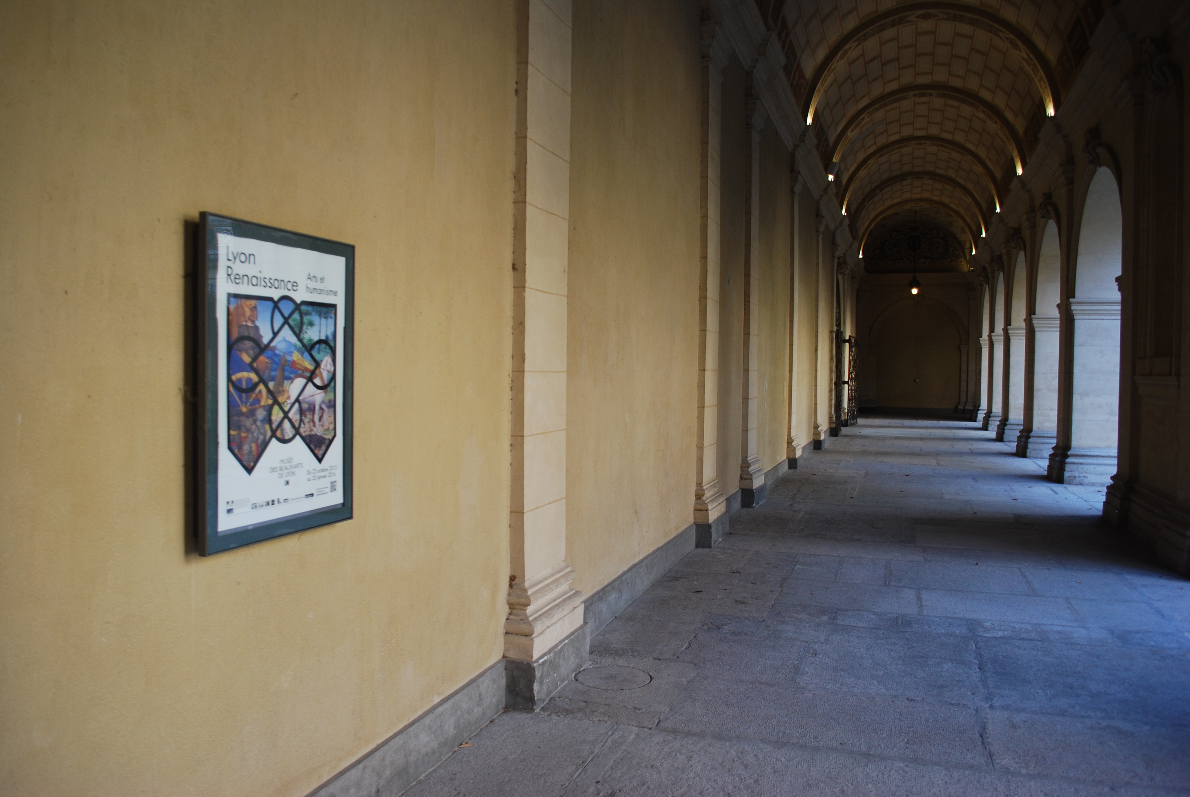 Vue de Lyon.